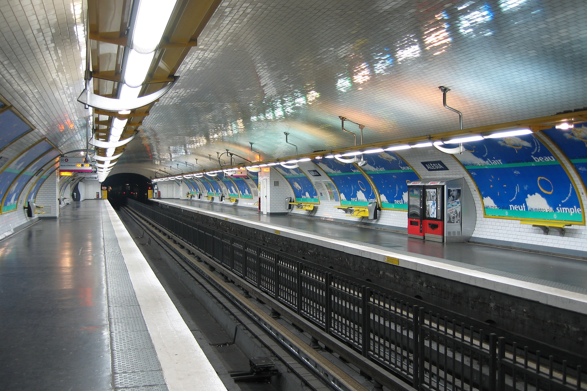 Vue des quais de la station Alésia de la ligne 4 du métro parisien, en direction de la Porte de Clignancourt, quelques jours avant la fermeture de la station pour rénovation des couloirs.